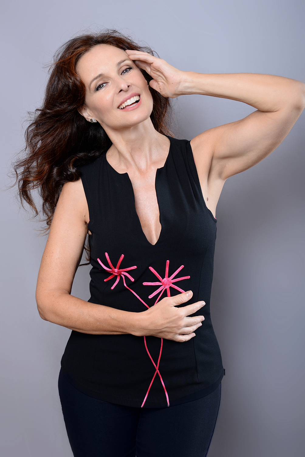 Sílvia Marsó (2019)